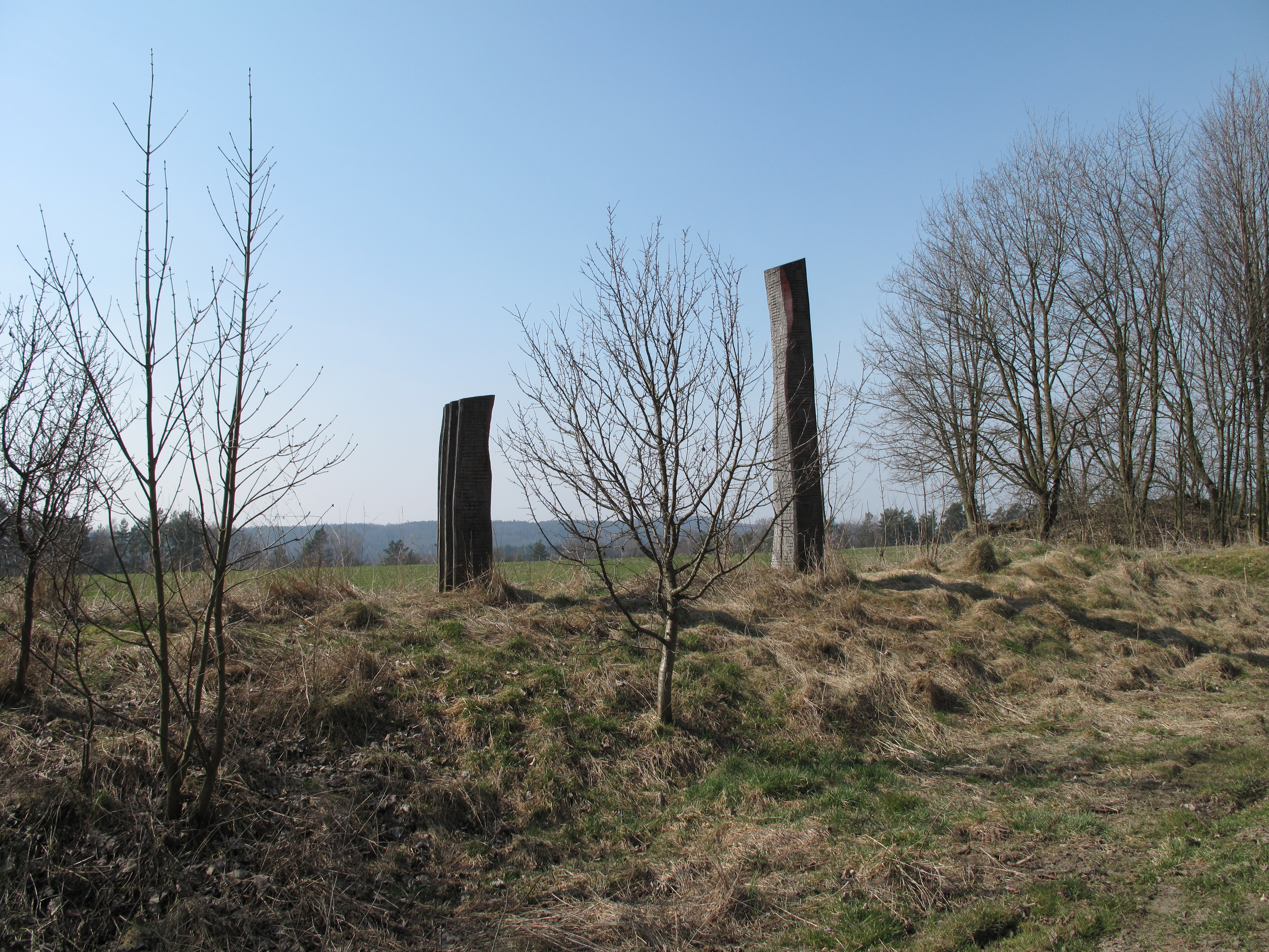 Sousoší Strážci od Jaroslava Rehny, 2002 nedaleko severně od Strážiště. Okres Mladá Boleslav, Česká republika. Object location50° 35′ 51.98″ N, 14° 55′ 28.02″ E